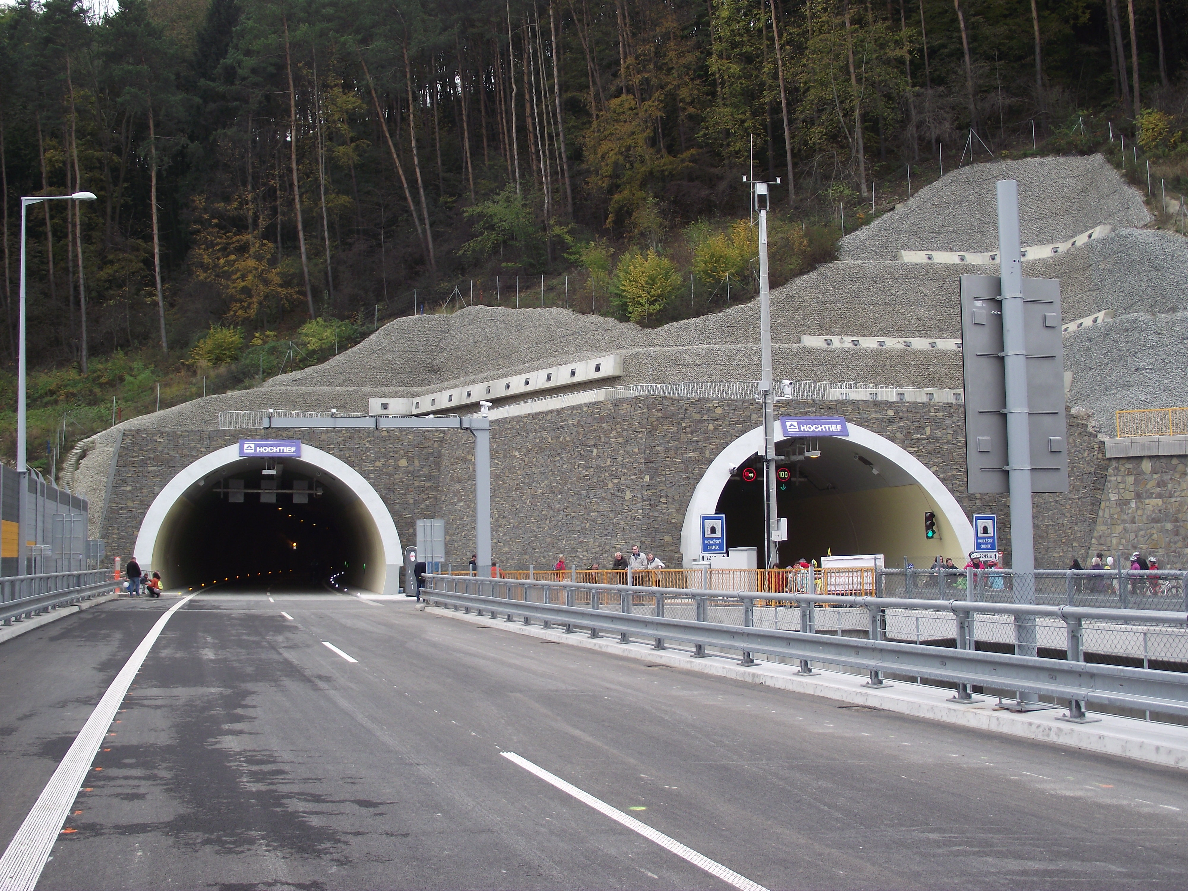 povazsky chlmec